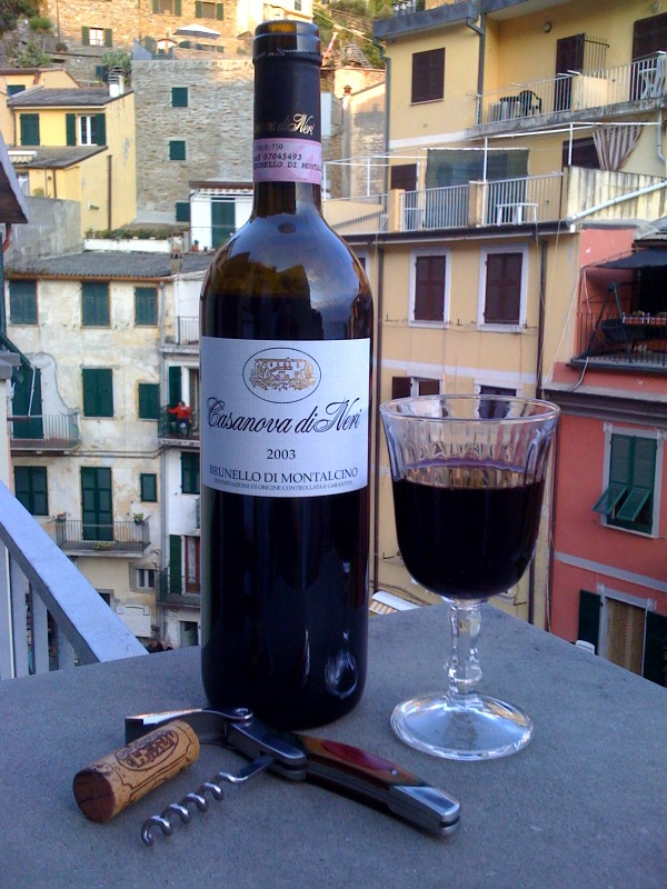 Casanova di Neri Brunello di Montalcino 2003 Italian wine from Tuscany made from Sangiovese